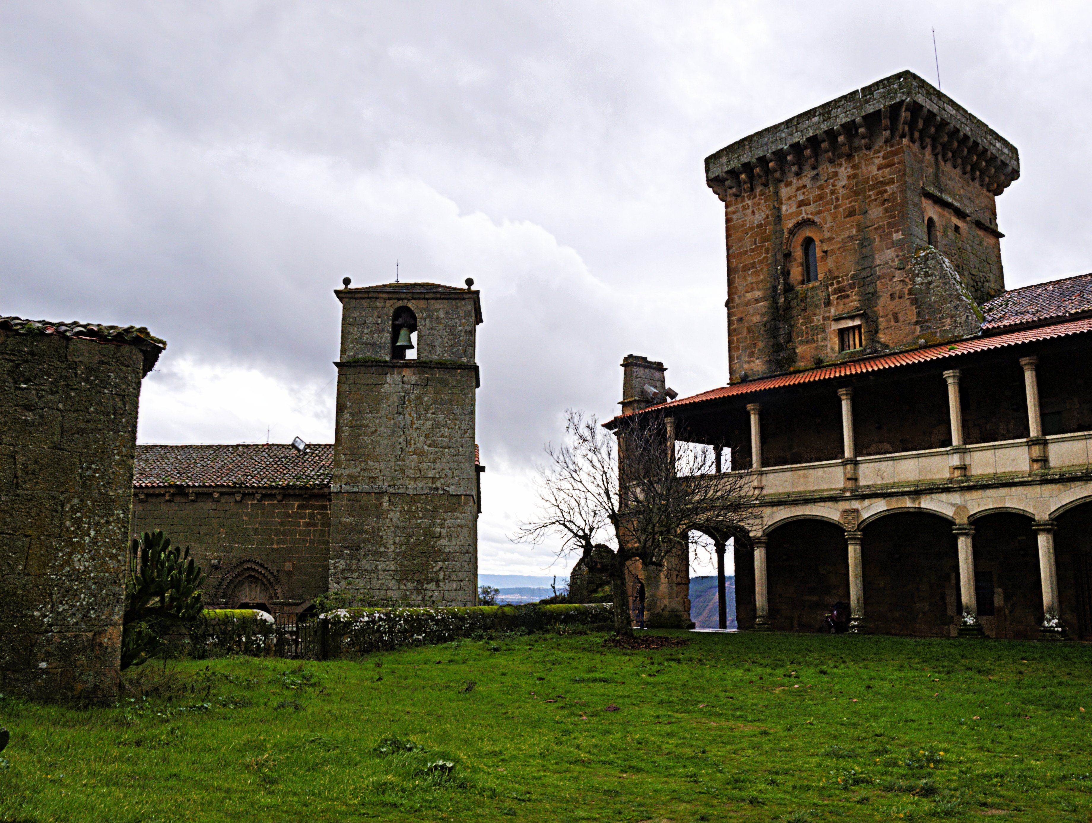 Castelo de Monterrei, Galiza